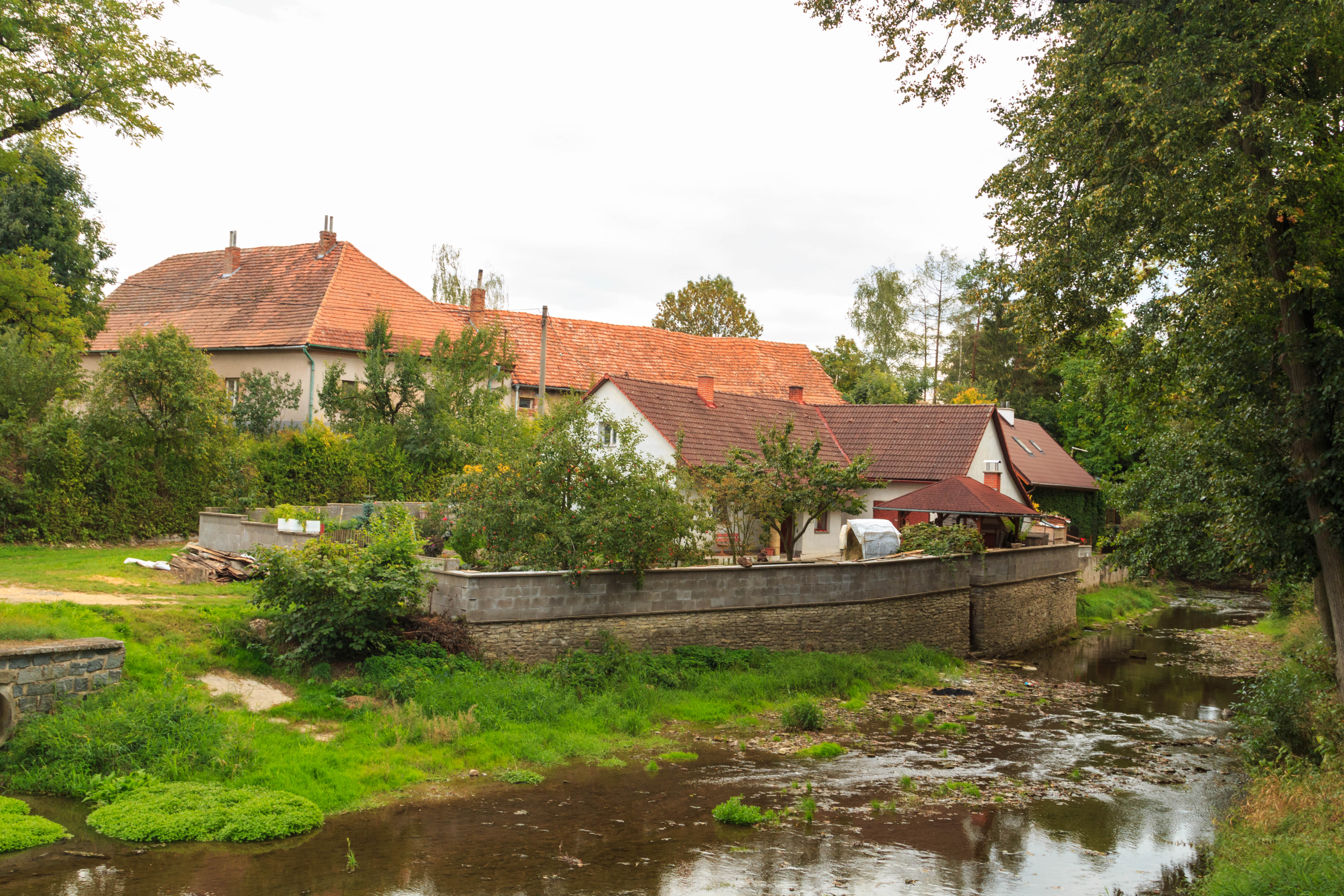 Jenišovice - Novohradka